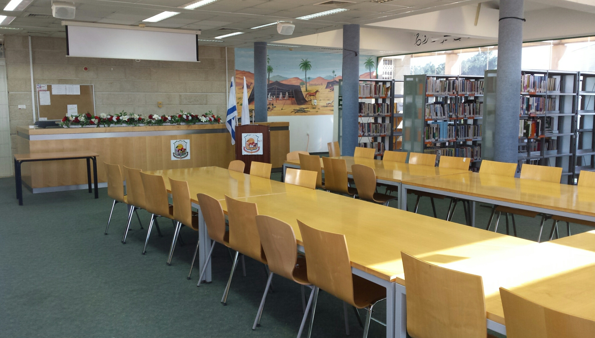 הספריה המרכזית של חורה